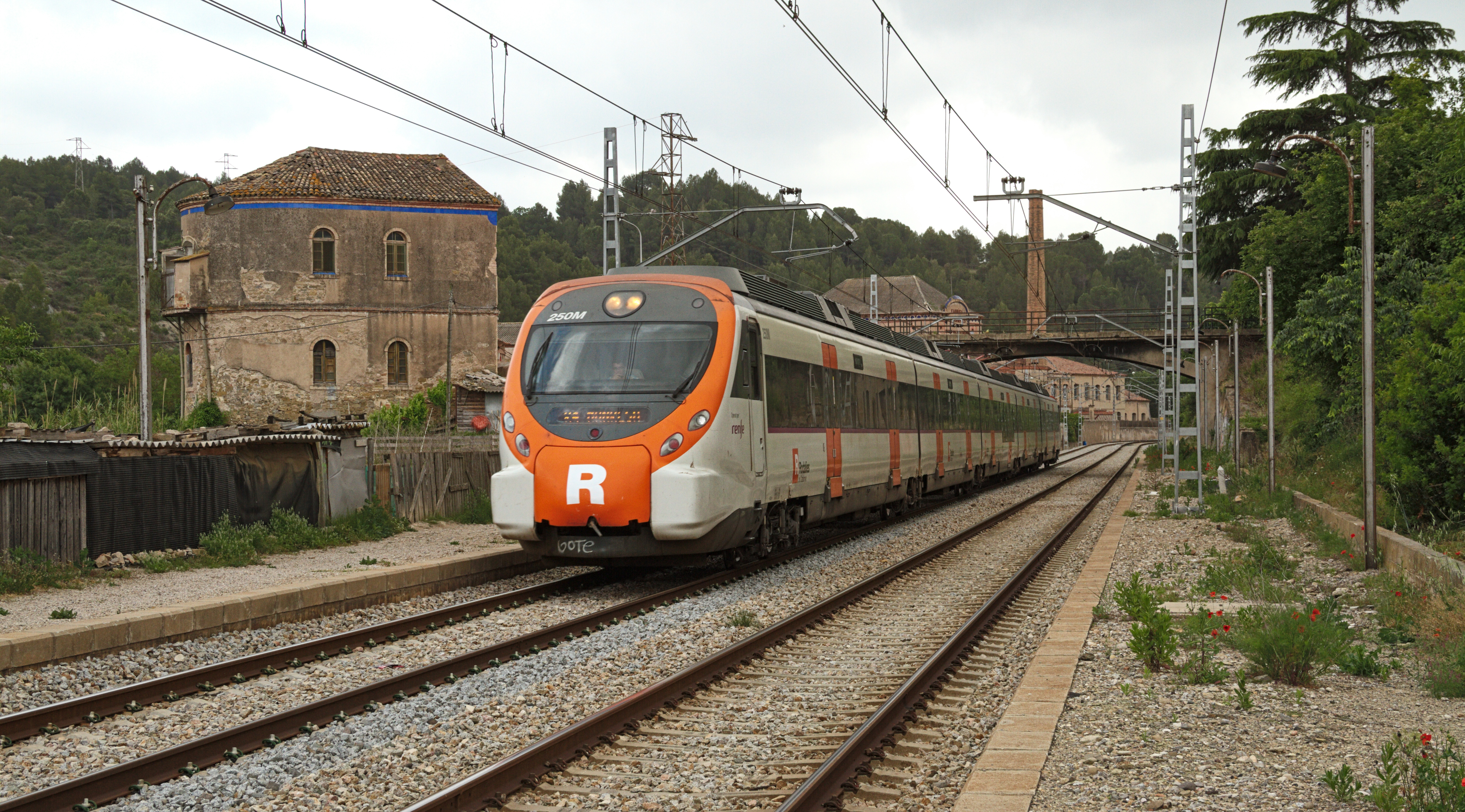 Puntual com un rellotge suís es va presentar el Civia que fa el semidirecte L'Hospitalet-Manresa al seu pas per l'antiga estació de Els Comtals, 12 minuts després va tornar a passar en sentit contrari fent el servei invers al de la foto.